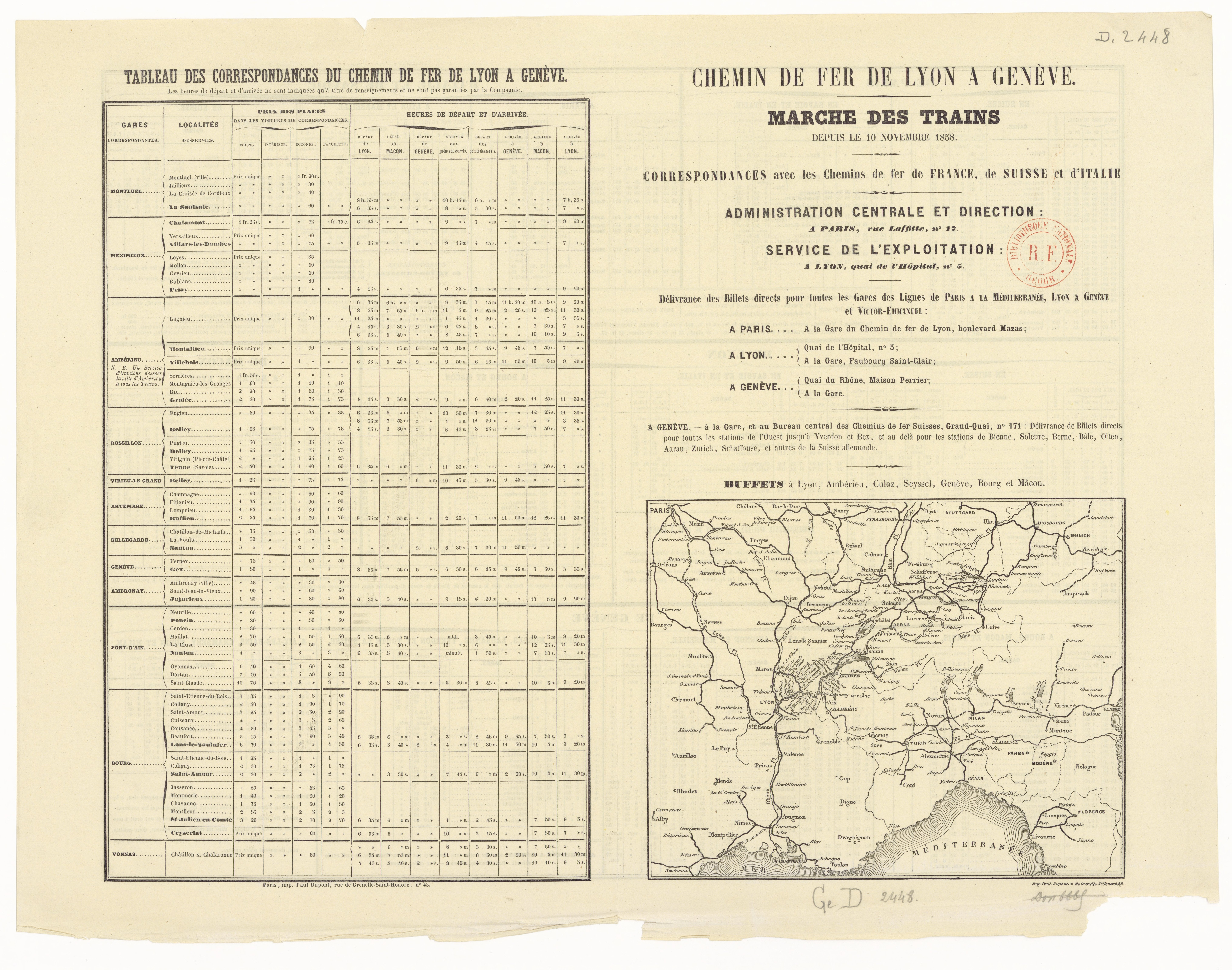 Chemin de fer de Lyon à Genève Marche des trains depuis le 10 novembre 1858. Correspondances les chemins de fer de France, de Suisse & d'Italie.